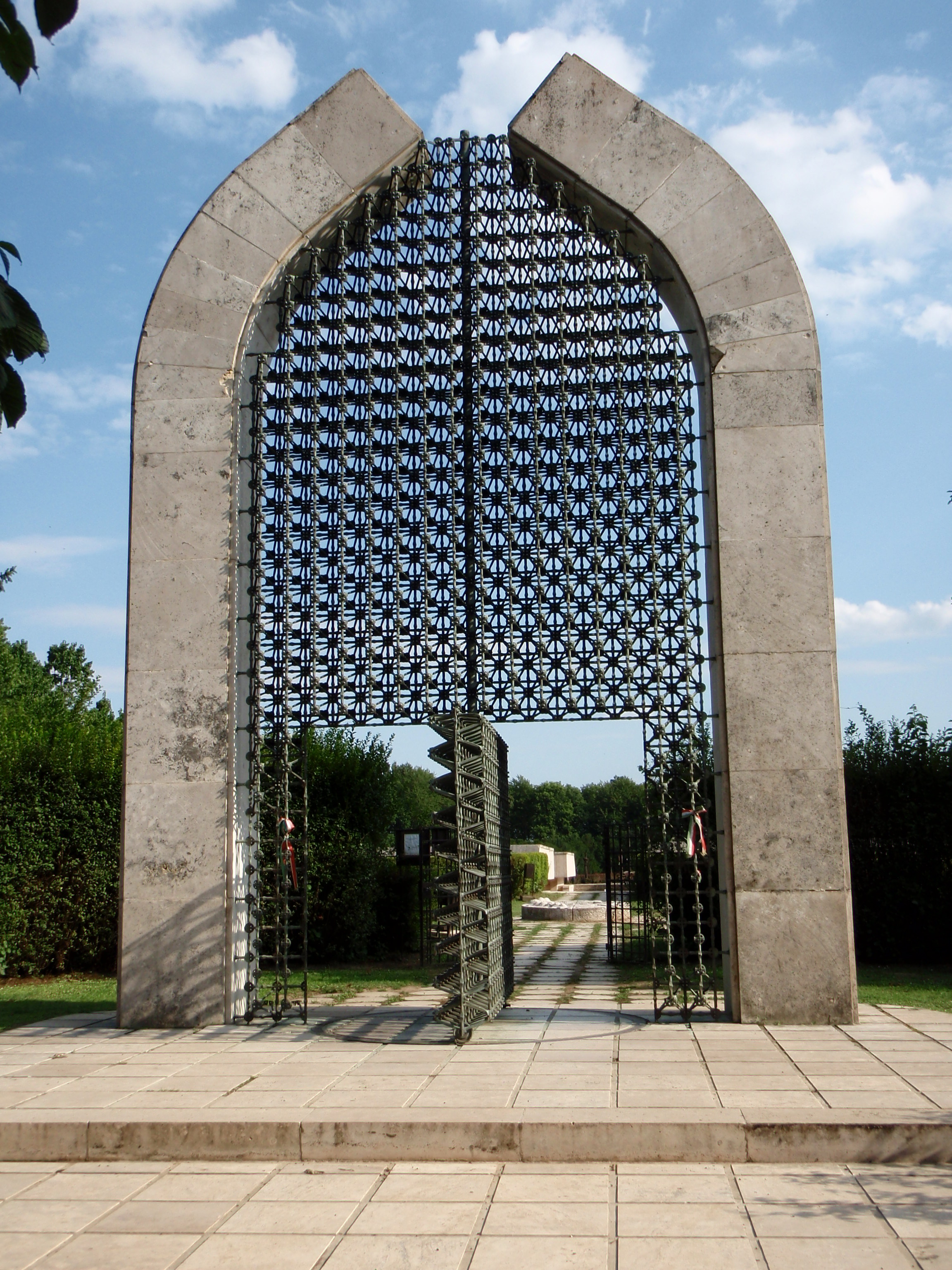 Ulaz u spomen park Mohačke bitke.